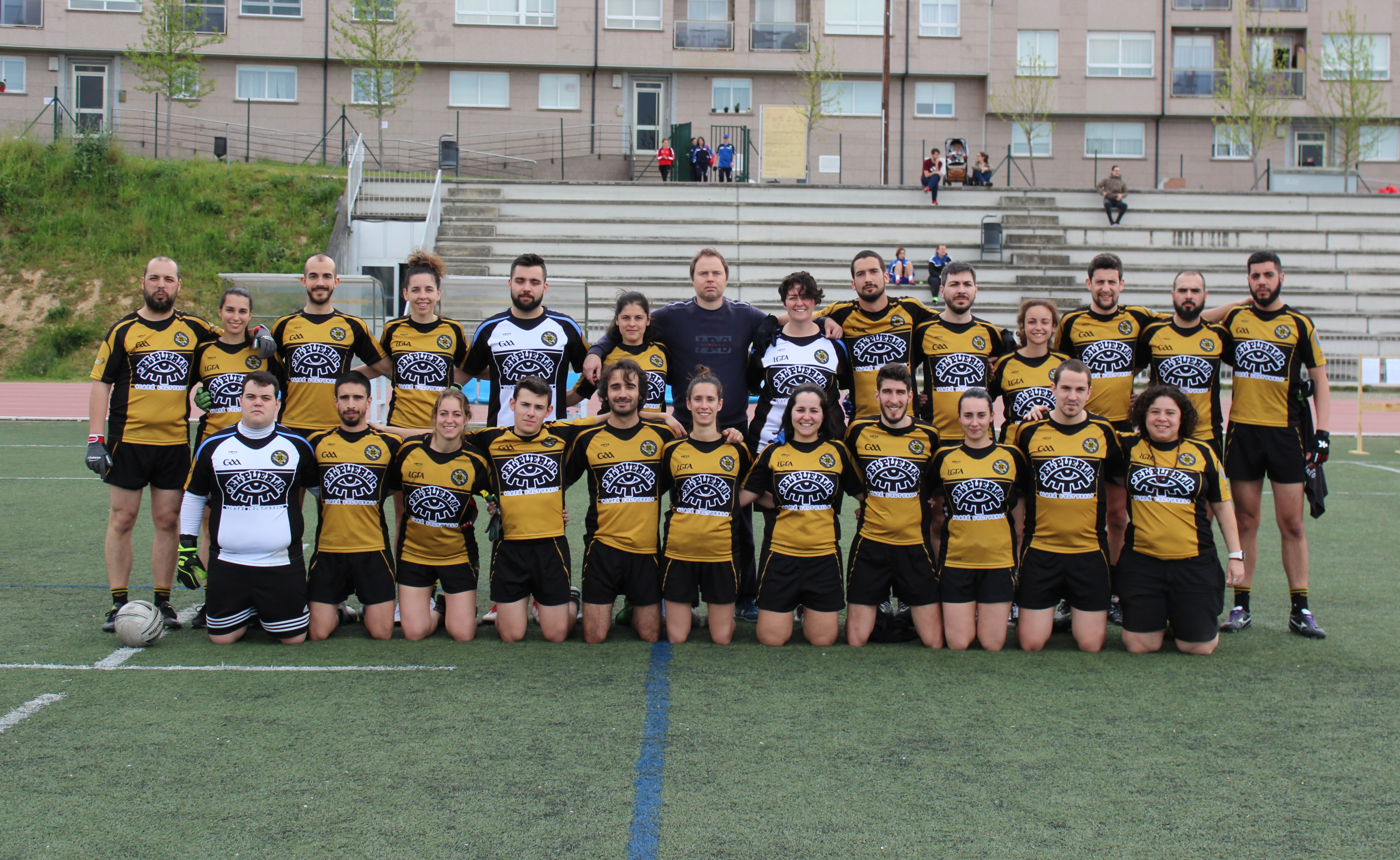 Imaxe dos equipos feminino e masculino nunha xornada da Liga 2018/19 en Ourense